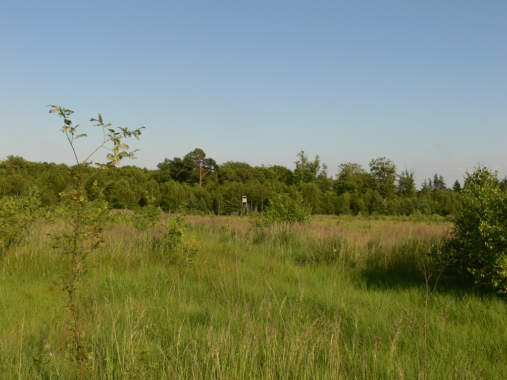 Ehemaliger Schießplatz in Wiethagen (Renaturiert)